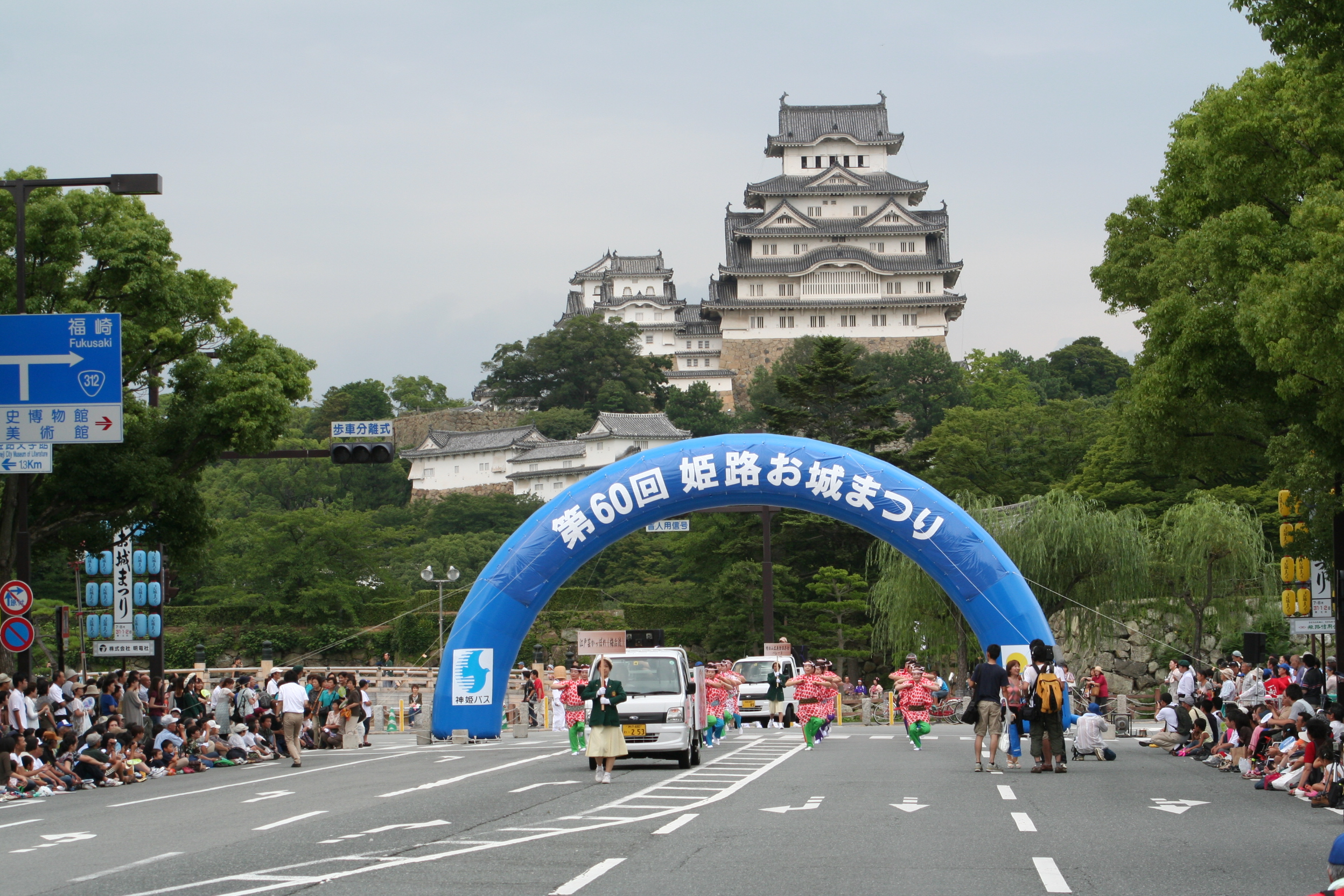 姫路お城祭。兵庫県姫路市にて毎年7月末から8月2日の3日間に渡り姫路城の南部大手前通りにて開催される祭である。第60回開催の2日目の祭の様子。